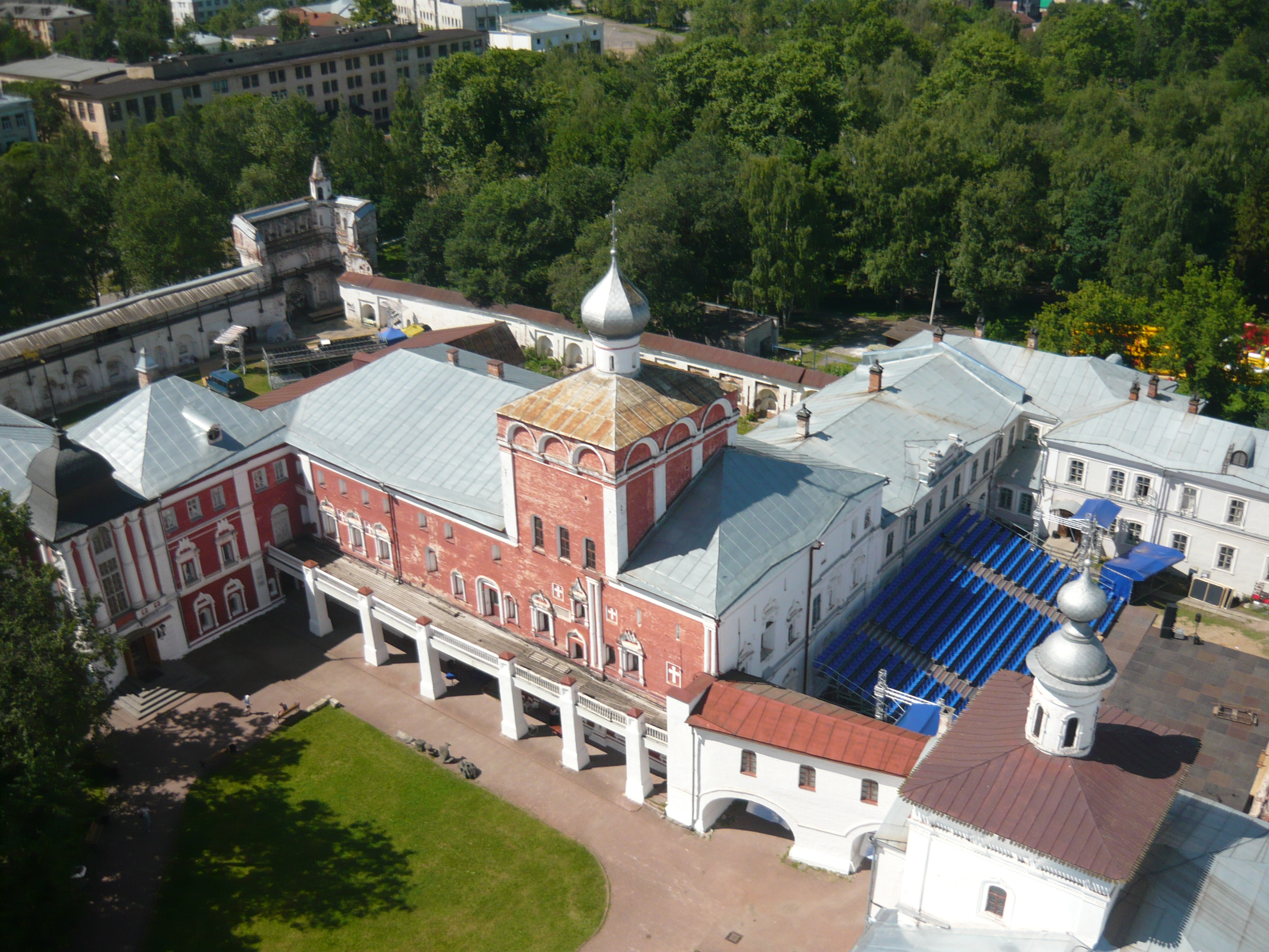 Вид с Колокольни